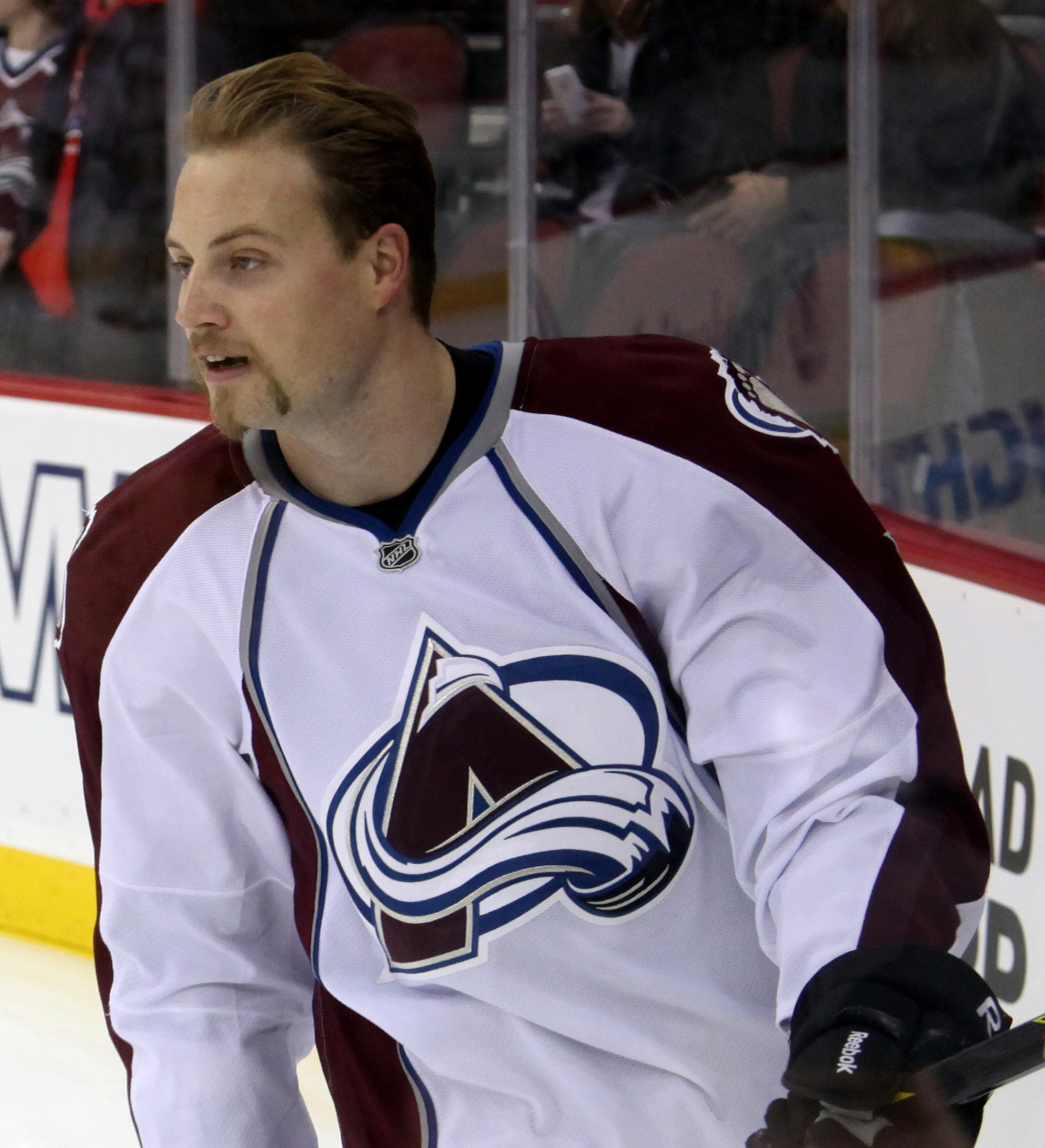 John Mitchell in November 2014.